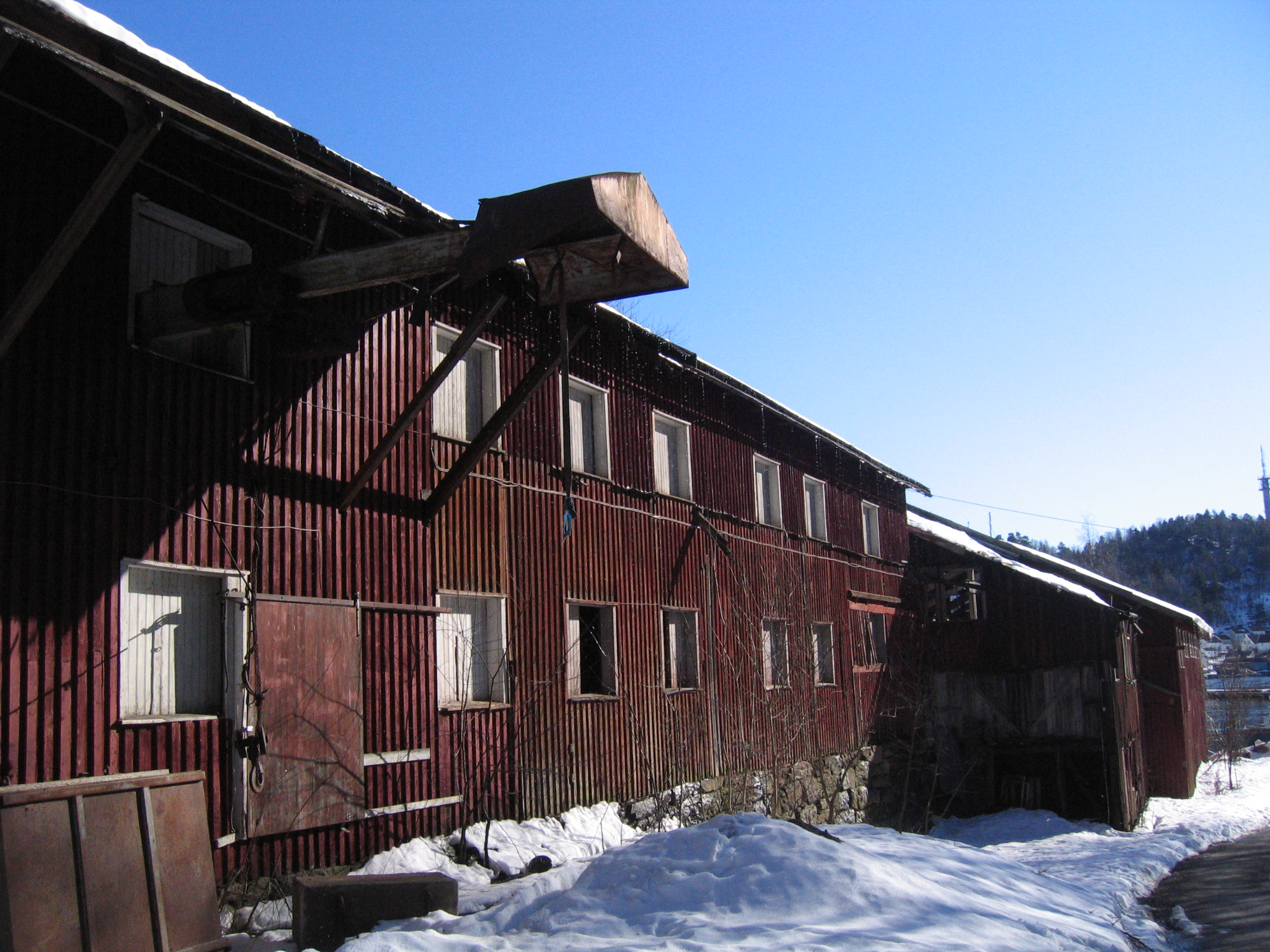 Strømsbu sag før rivingen av den midtre delen i 2007